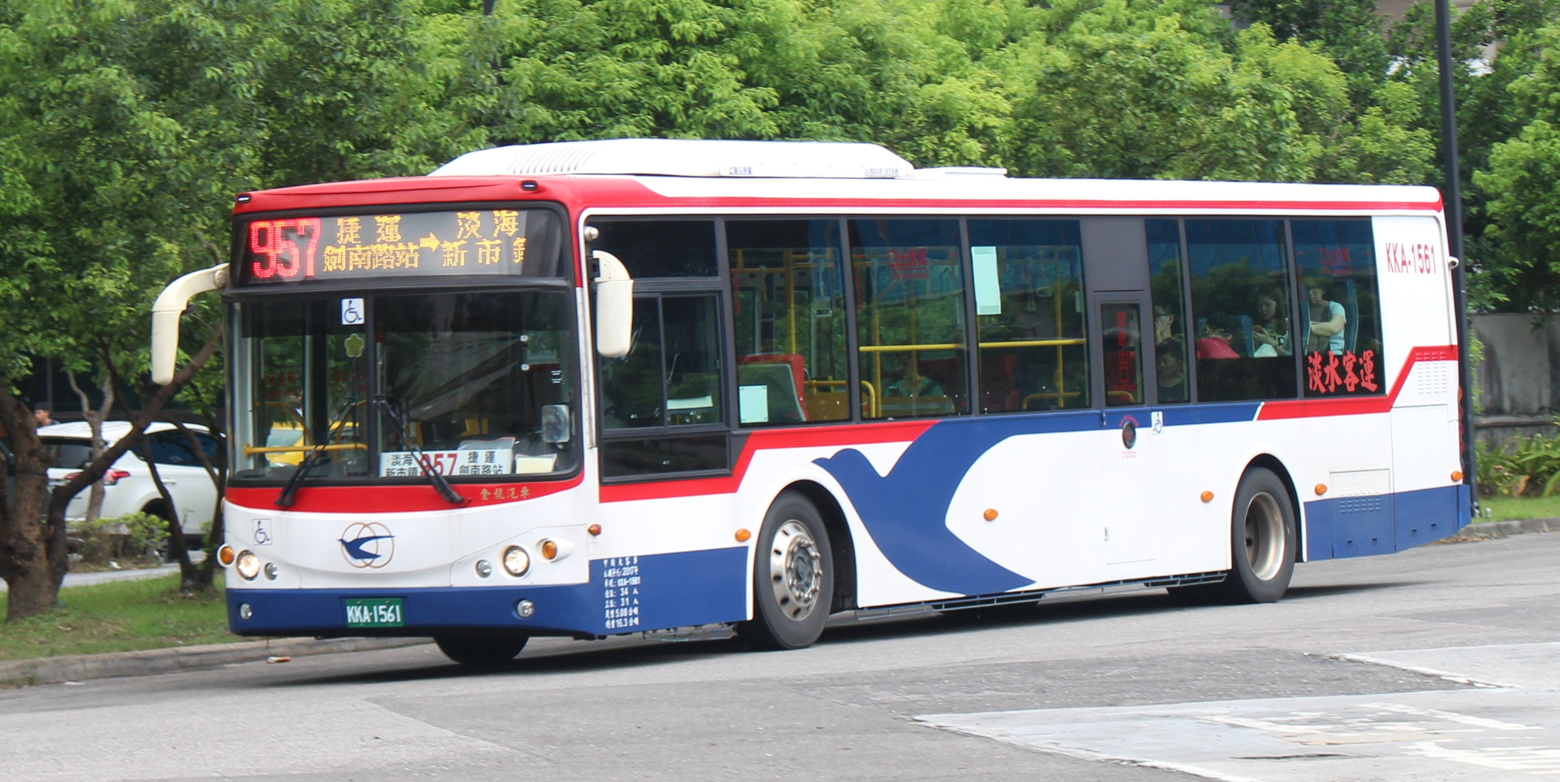 淡水客運KKA-1561 957 KL6120U1